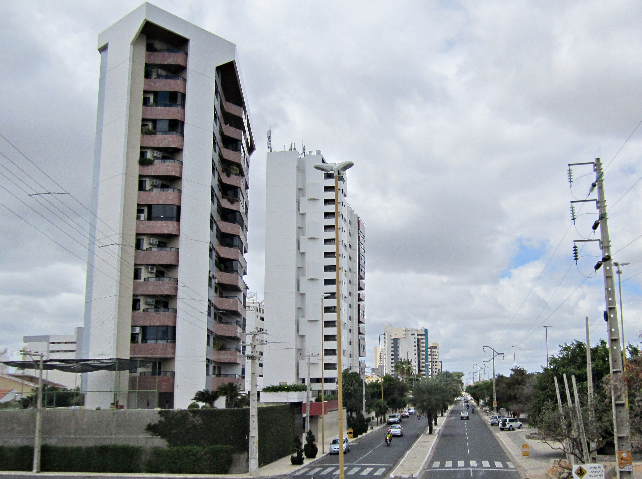 Orla I - Petrolina, Pernambuco, Brasil